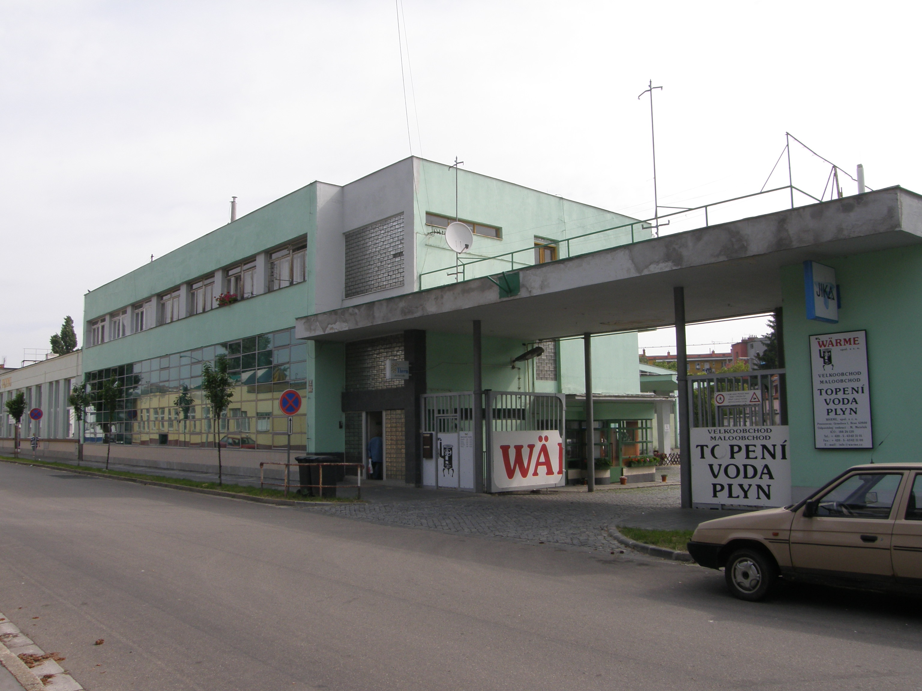 Garáže Grmelova